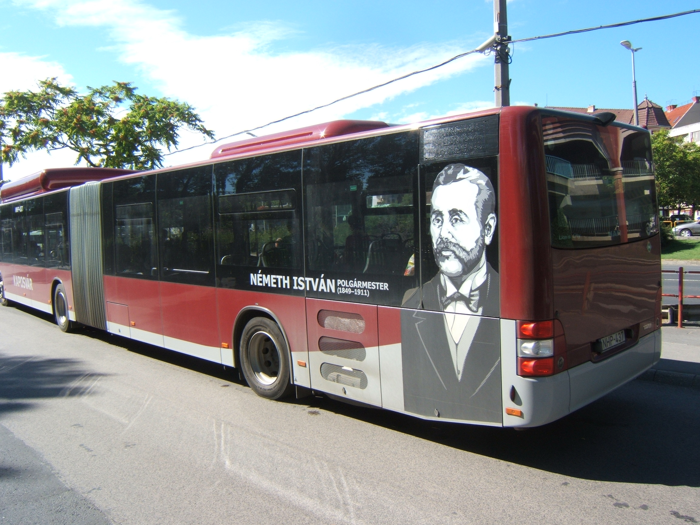 Kaposvár, MAN A40 Lion's City GL NG313 CNG busz